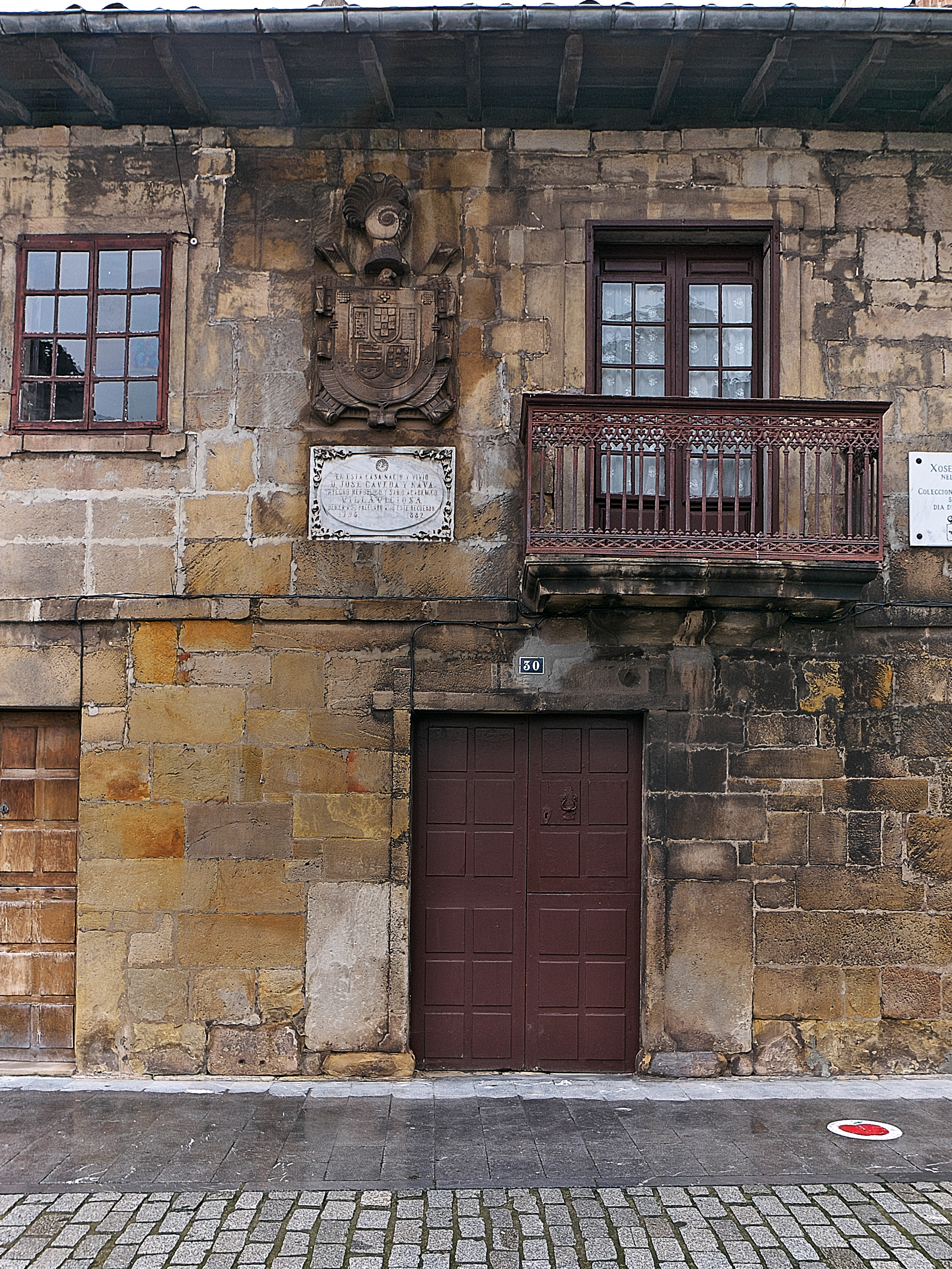 Fachada de la casa de José Caveda y Nava, hoy calle del Agua, num. 30, Villaviciosa.